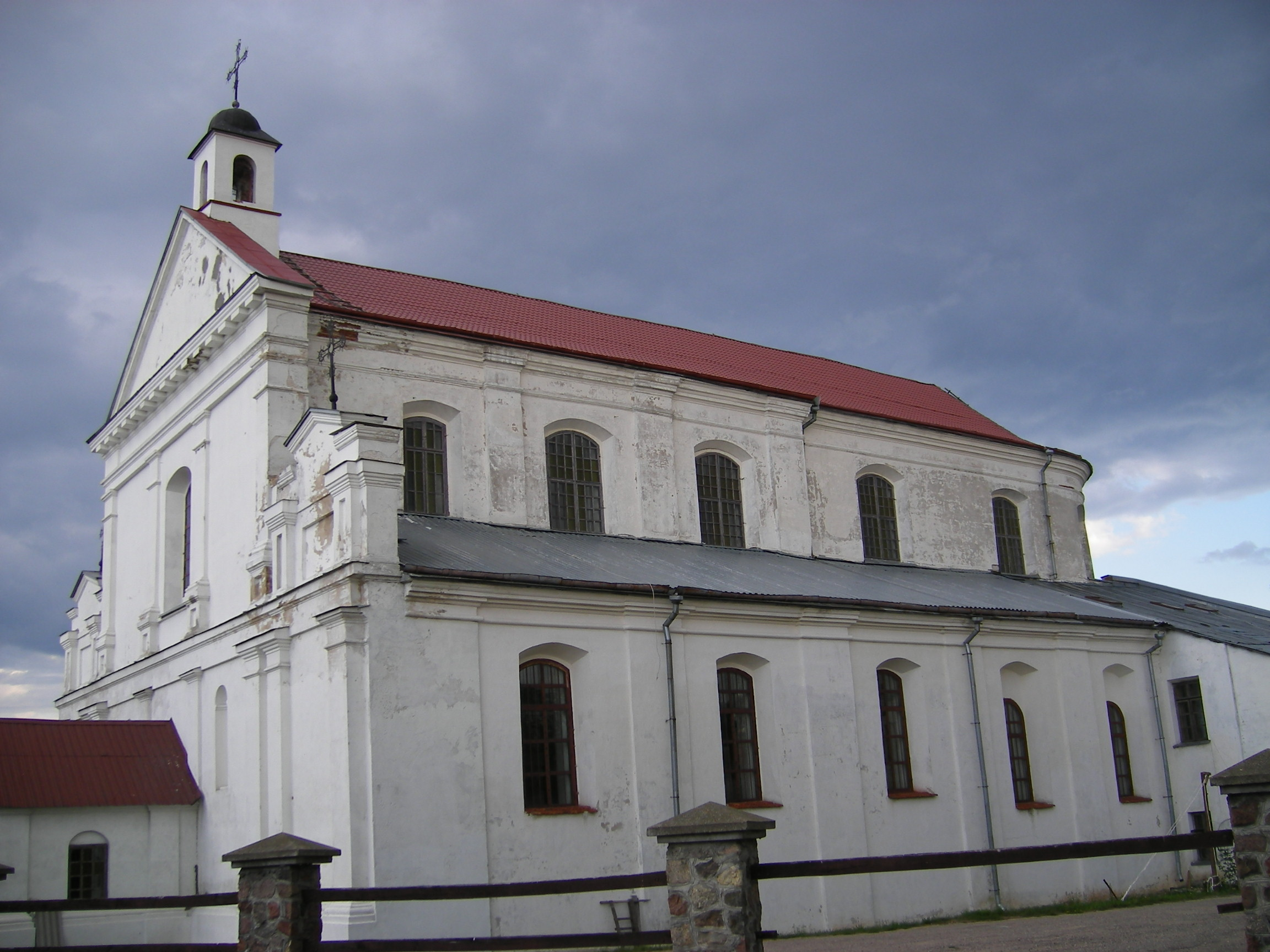 Navahrudak, St. Michael´s church kостел св. Михаила Архангела